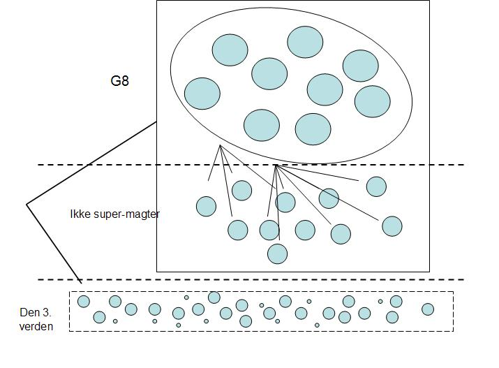 Multipolaritet vil sige en balance mellem flere magter, hvoraf ingen formår at dominere resten